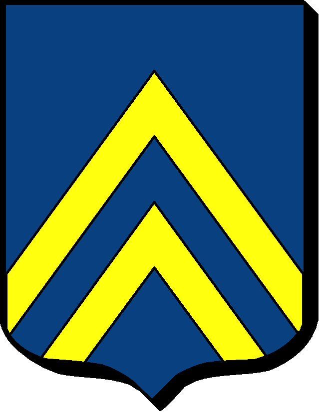 D'azur, à deux chevrons d'or.